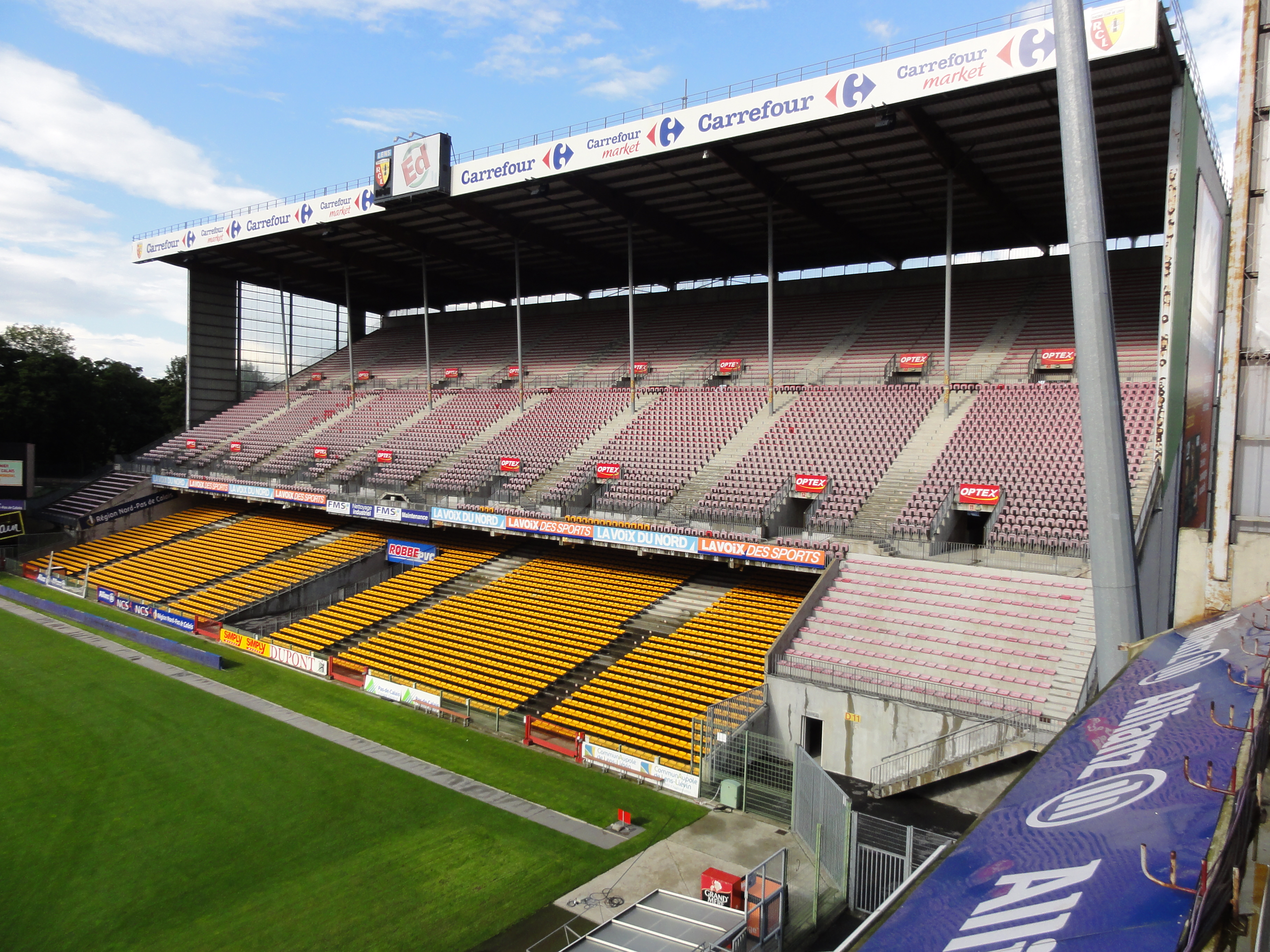 Le Stade Félix-Bollaert à Lens a été utilisé le vendredi 6 juillet 2012 pour fêter de manière officielle le classement de 353 éléments répartis sur 109 sites du bassin minier du Nord-Pas-de-Calais au patrimoine mondial de l'Unesco.